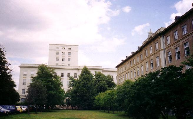 Ansicht des Gebäudes der ehemaligen HfV, in dem sich heute die HTW Dresden befindet. Inder Bildmitte das sog. "Zentrale Institutsgebäude" und am rechten Bildrand das "Seminargebäude".